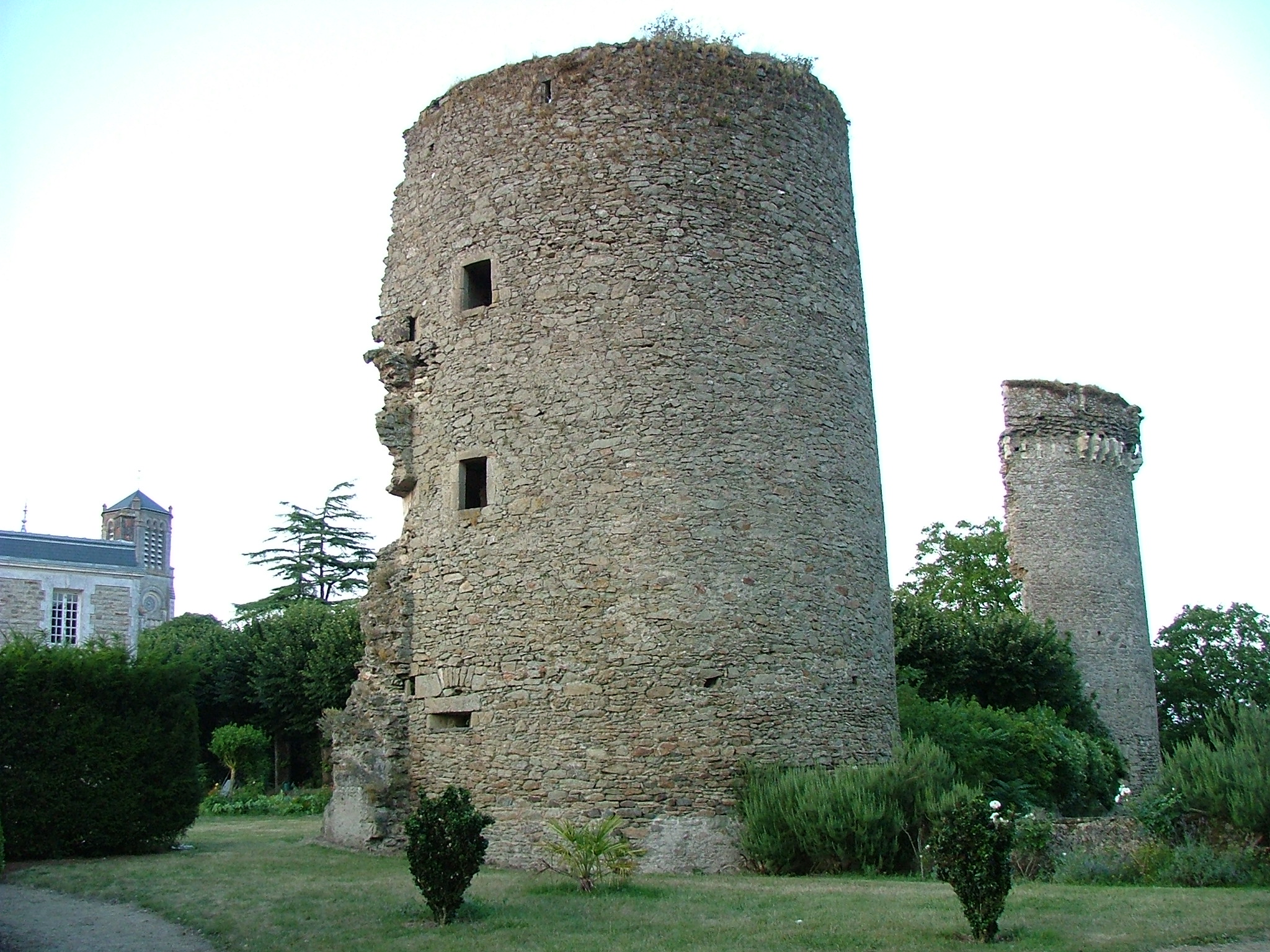 Vue des deux tours des ruines du château de La Garnache (Vendée).